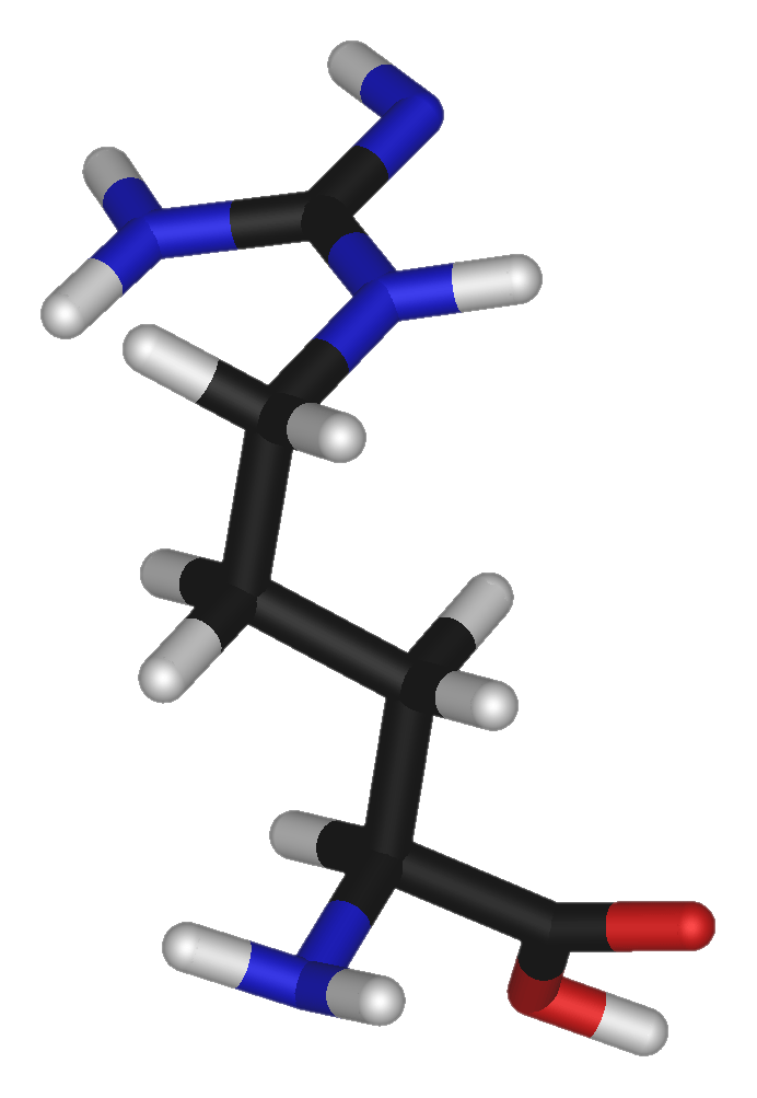 Estructura 3D de L-arginina